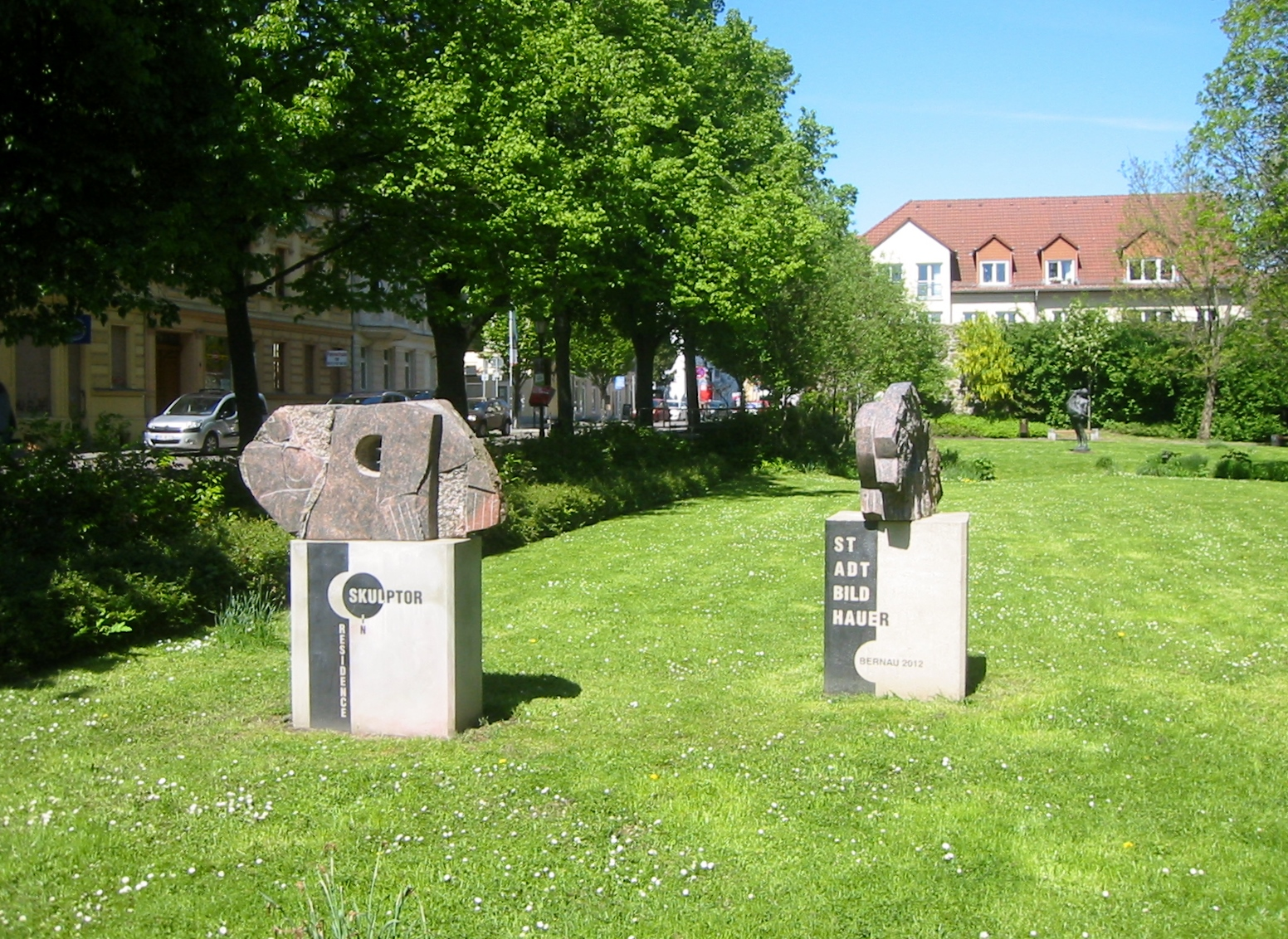 Blick in den Goethepark in Bernau bei Berlin mit zwei Skulpturen "Tag und Nacht" von Jörg Steinert